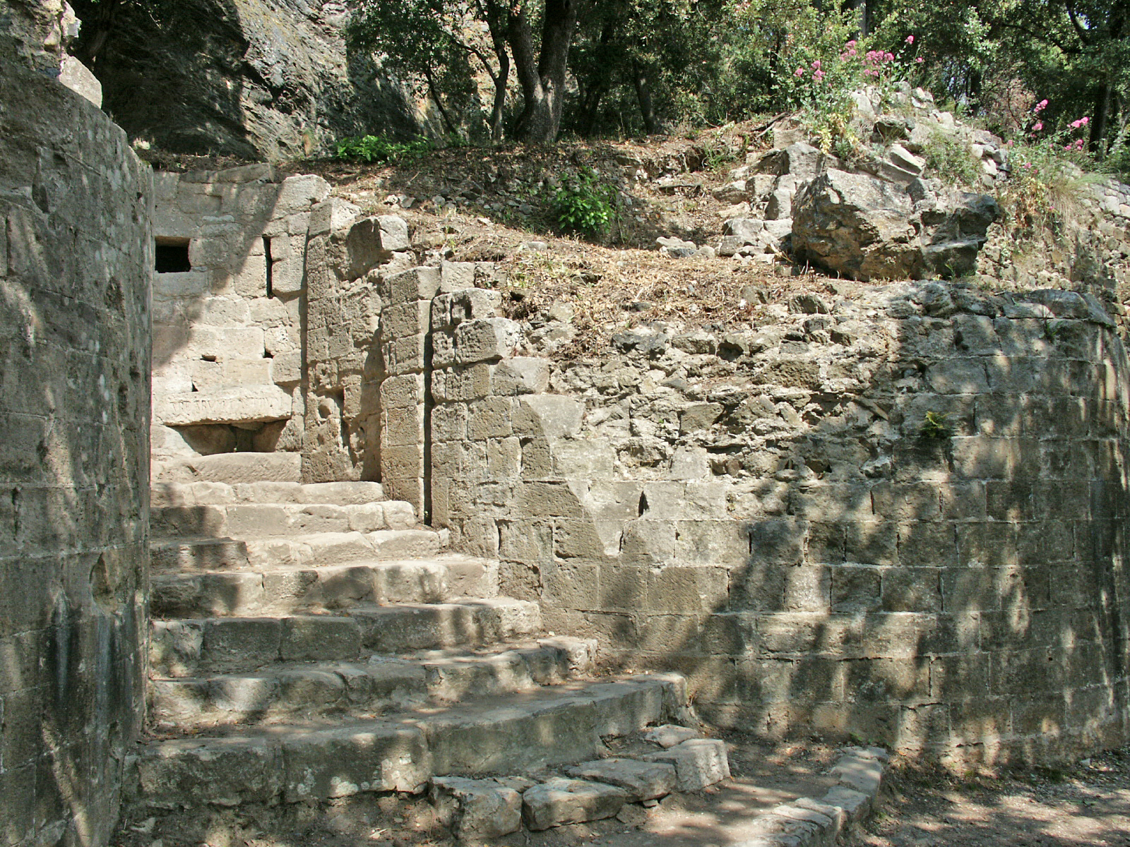 Entrée principale du château médiéval d'Hyères. Elle était encadrée par deux tours rondes et donnait directement sur la ville haute. La photo est prise de l'extérieur.